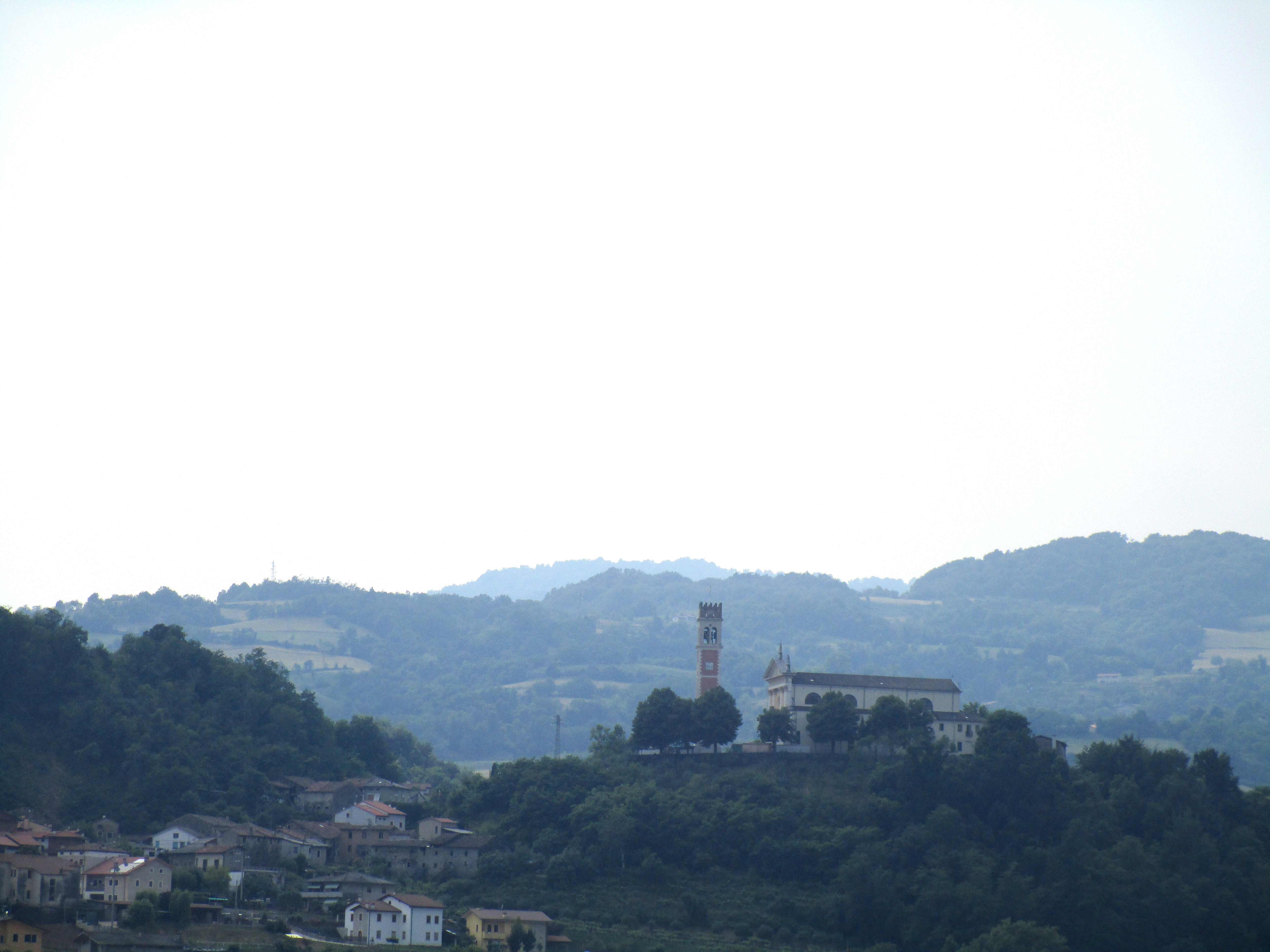 Lovara di Trissino vista dalla località Piana Cattiva di mezzo o Carazzi.